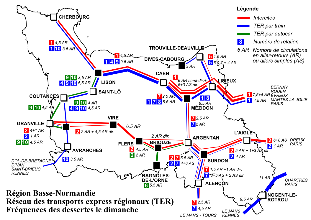 TER Basse-Normandie, fréquence des dessertes le dimanche, horaire annuel 2012.